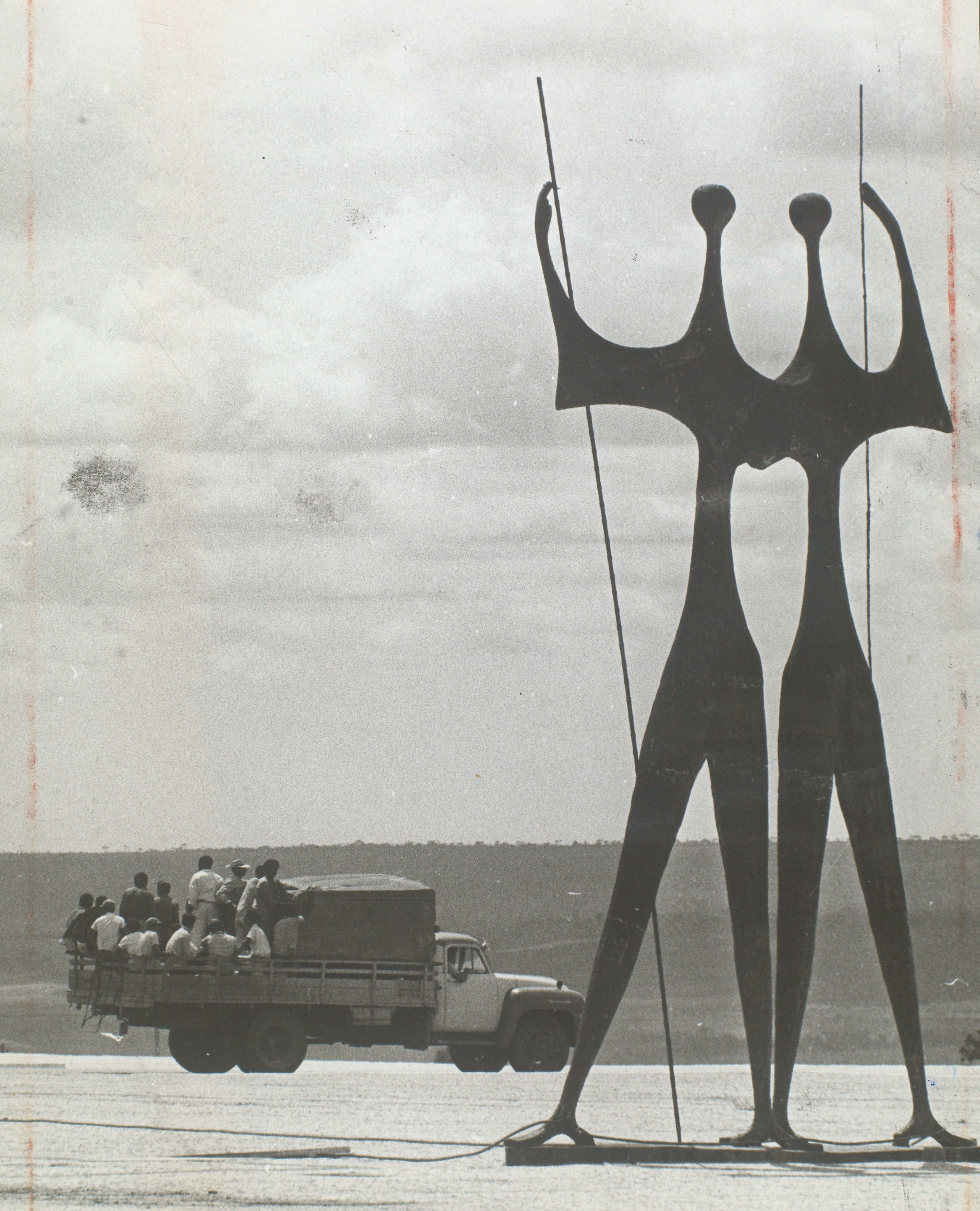 Fotografia do Fundo Correio da Manhã, sob a guarda do Arquivo Nacional.